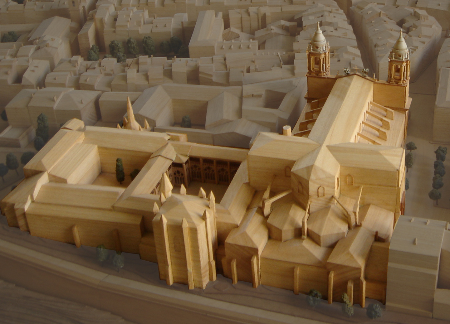 Parte de una maqueta de Pamplona en 1900, en la que se destaca el conjunto catedralicio de dicha ciudad